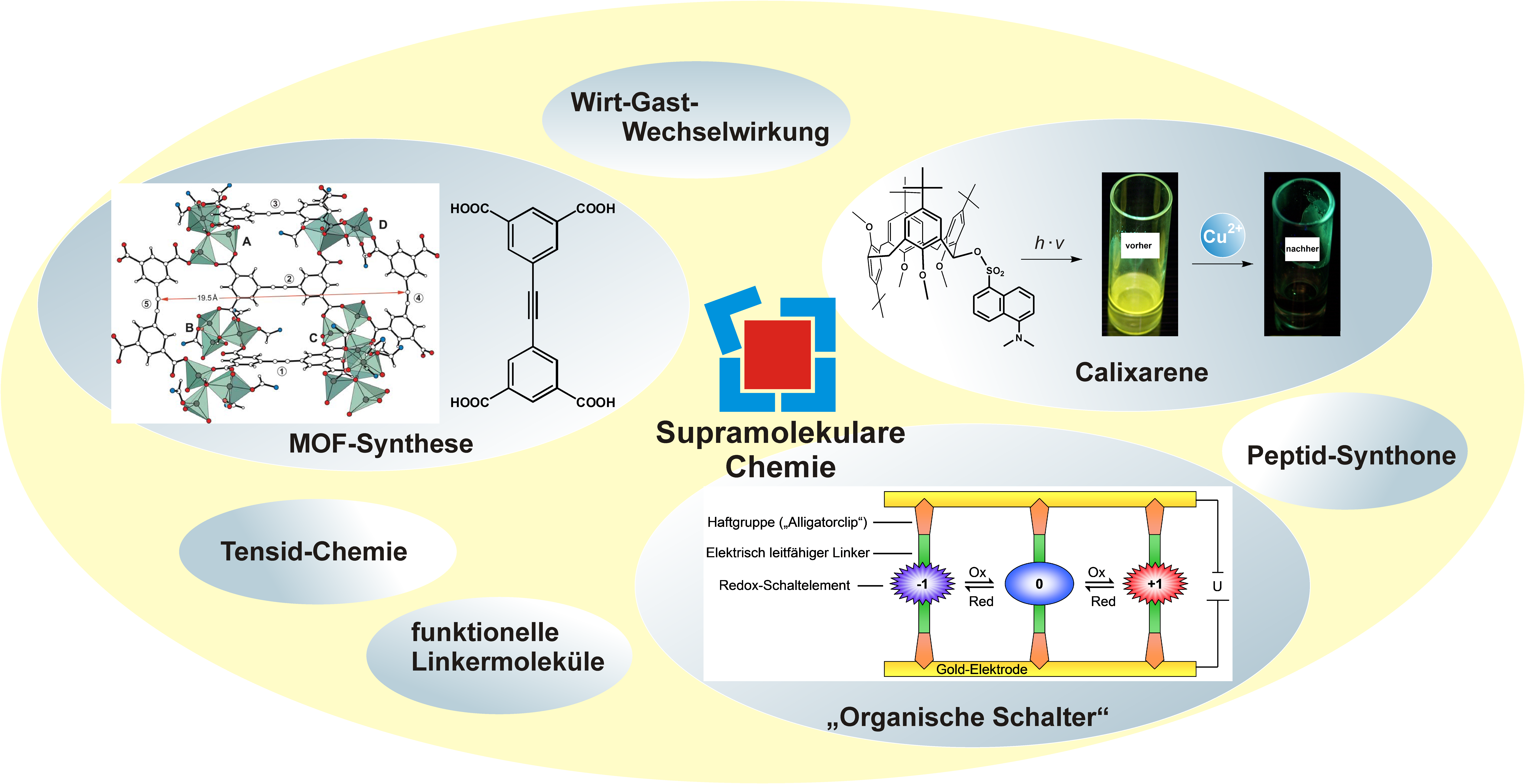 Themenübersicht